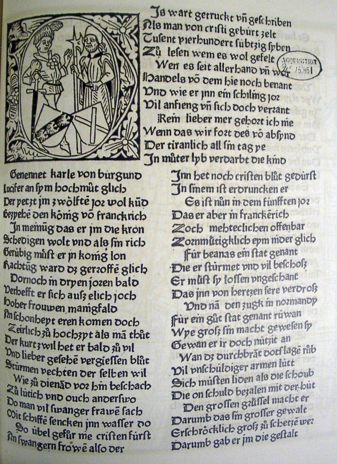 Tüsch, Hans Erhart: Burgundische Historie. Straßburg: [Heinrich Knoblochtzer], Hain 6664, 1477 ISTC it00495000, Textbeginn